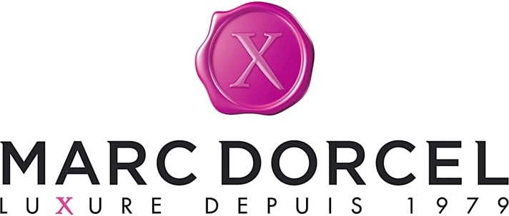 Logo von Maarc Dorcel Production